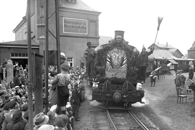 Die grosse Walpurgisfeier auf dem Brocken im Harz ! Der heilige Gedächtnistag der Patronin "Walpurga" gegen Hexenkünste ! Von Zuschauern umlagert fährt der Walpurgiszug der Brockenbahn mit den Hexen und Geistern zum Blocksberg.